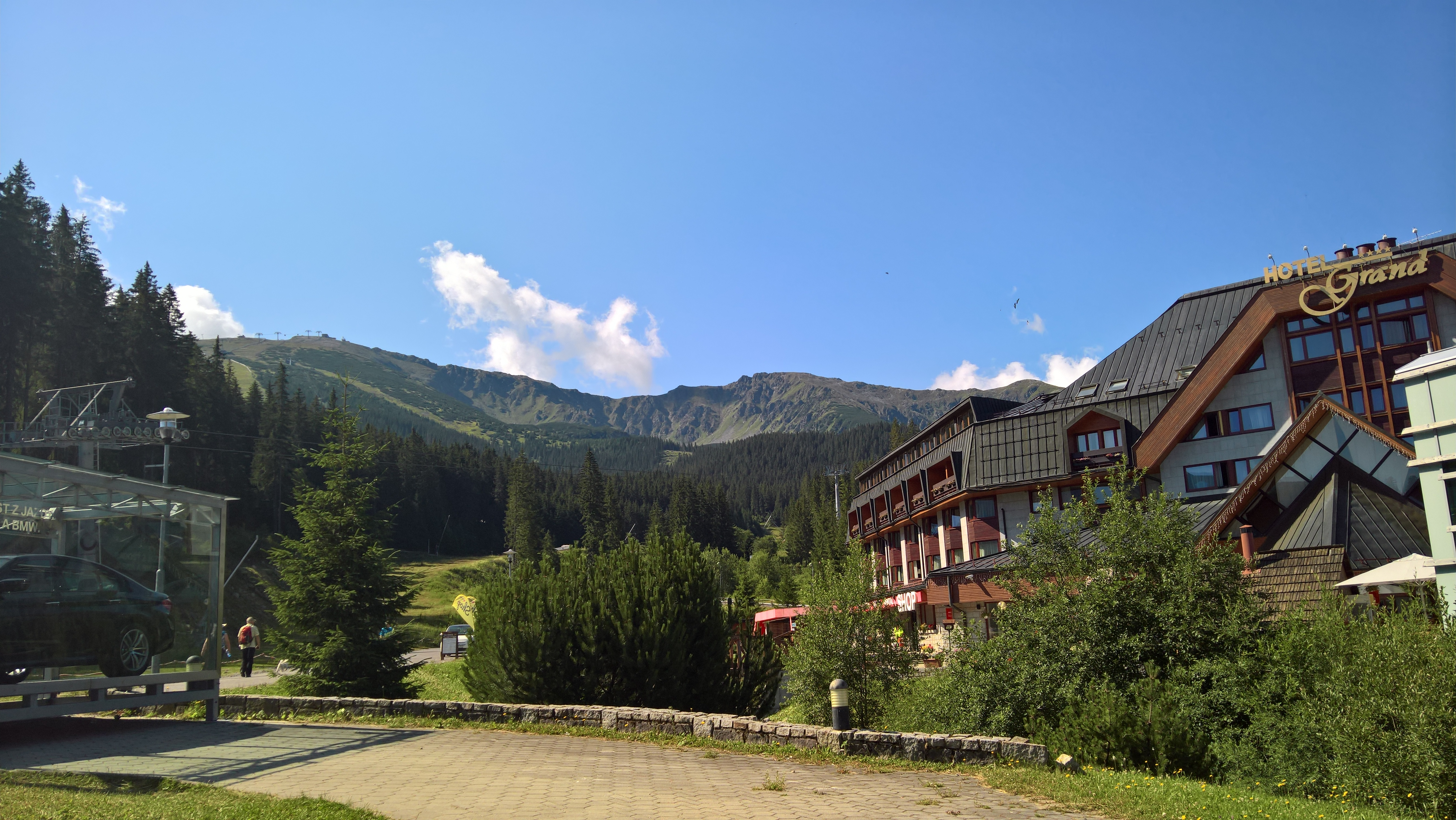 Pohled na horu Chopok, v pozadí hotel Grand ****, Demanovská dolina, Jasná